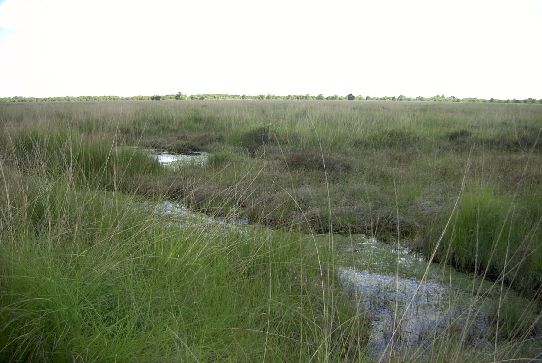 NSG „Ewiges Meer“, Hochmoorweite